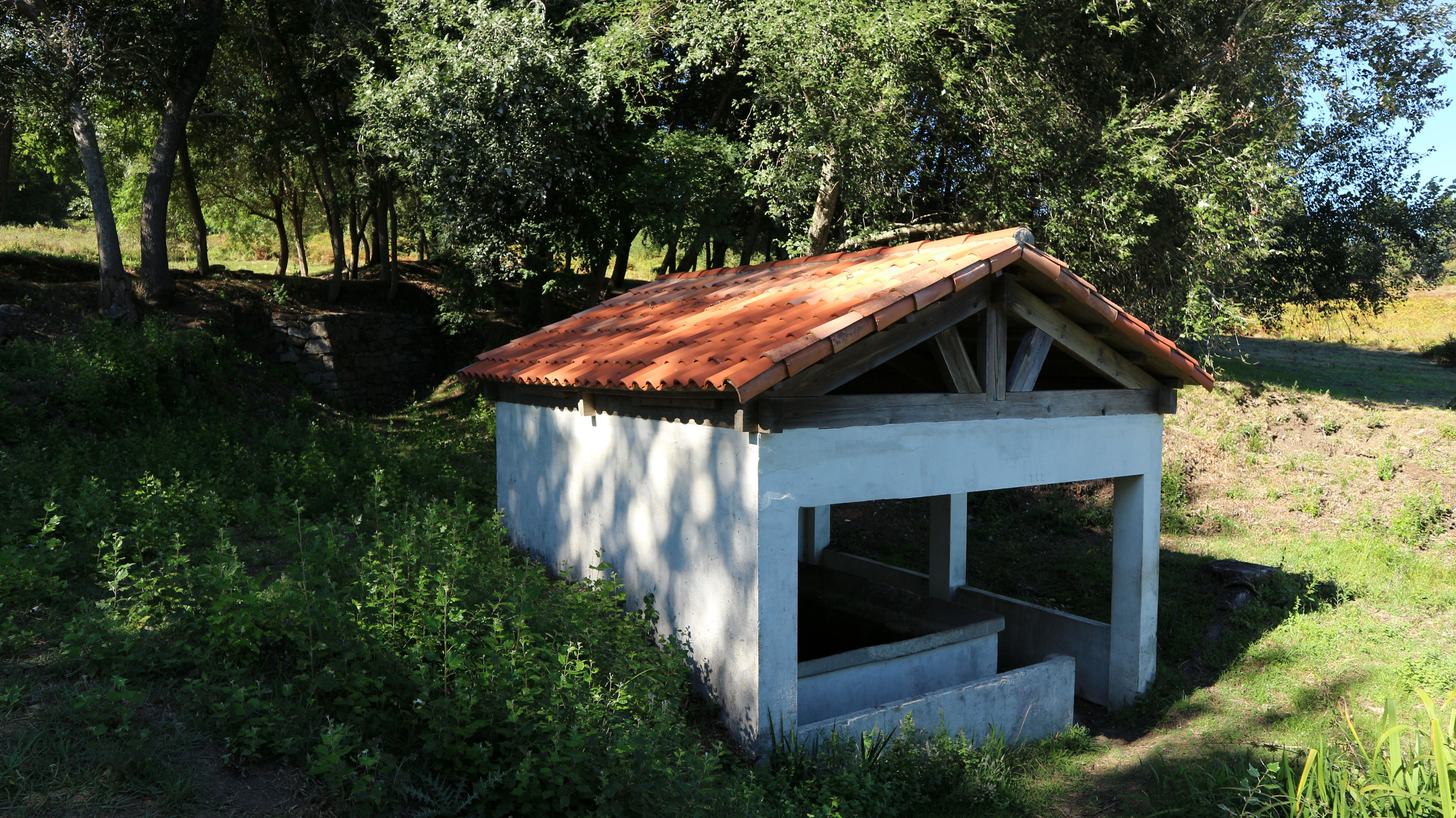 De Cucorno ao Cano. A Illa de Ons, Ons, Bueu - Parque Nacional das Illas Atlánticas de Galicia.